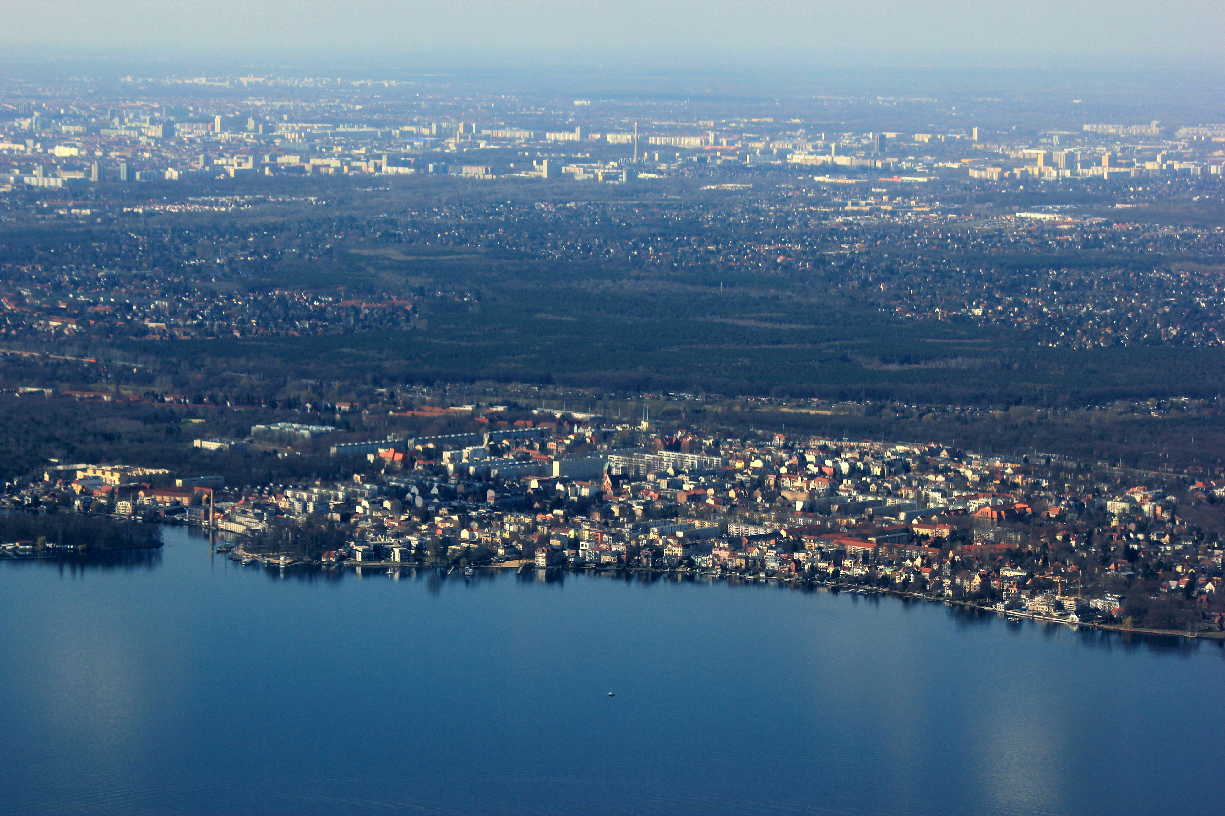 Blick auf Berlin-Friedrichshagen aus dem Flugzeug im Landeanflug auf Schönefeld.